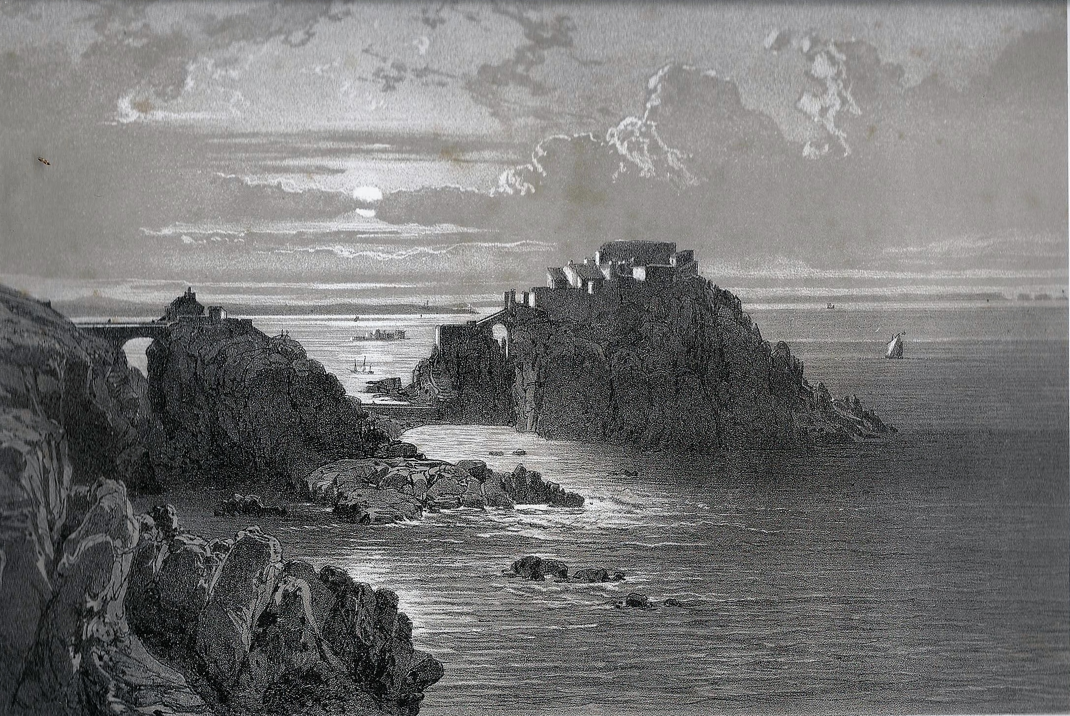 "Fort Bertheaume, près de l'entrée du Goulet de Brest ( (Félix Benoist, "La Bretagne contemporaine", tome "Finistère", 1867).